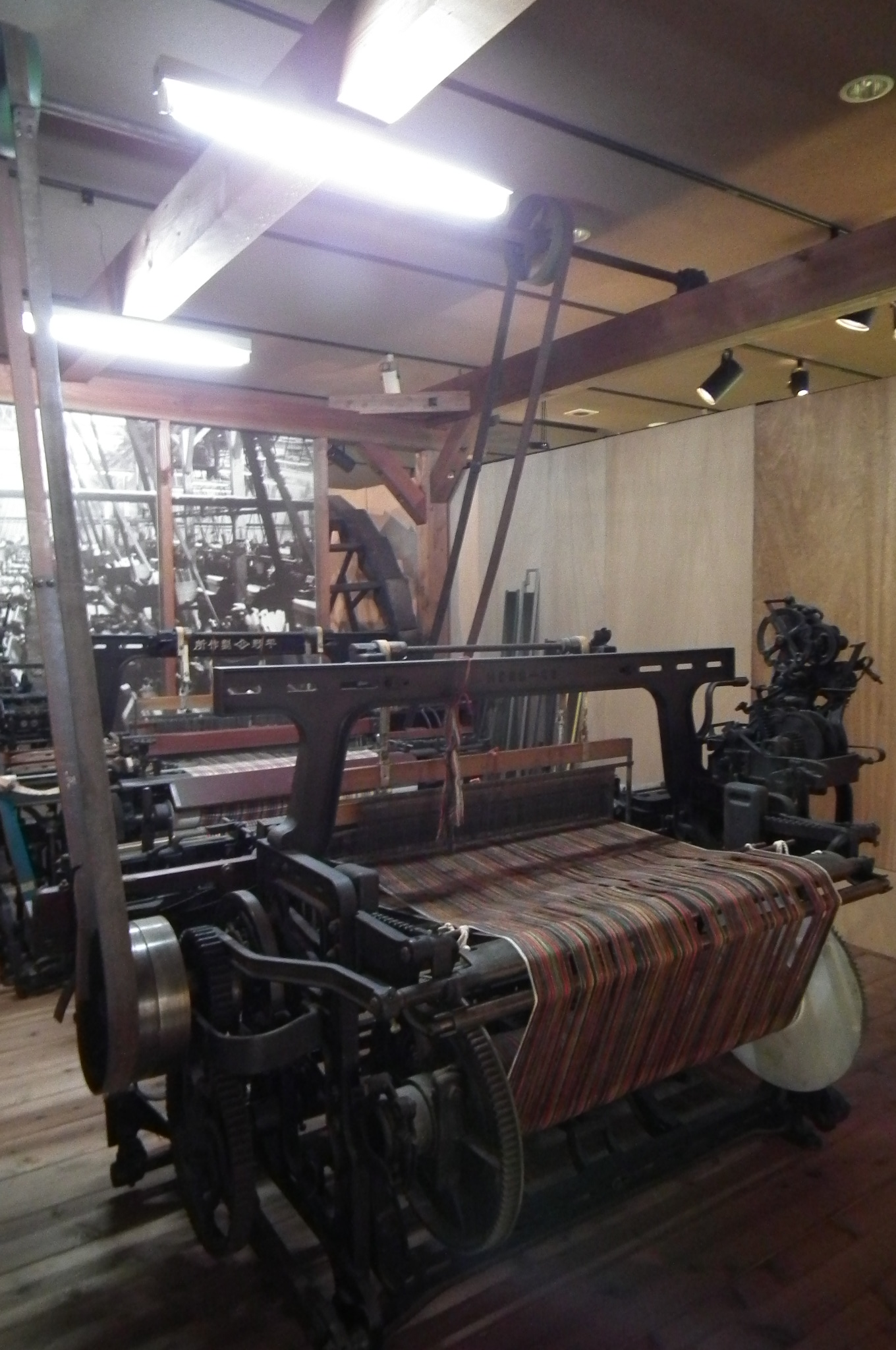 36 inches Power loom Hirano-seisakusho 36インチ力織機 平野製作所